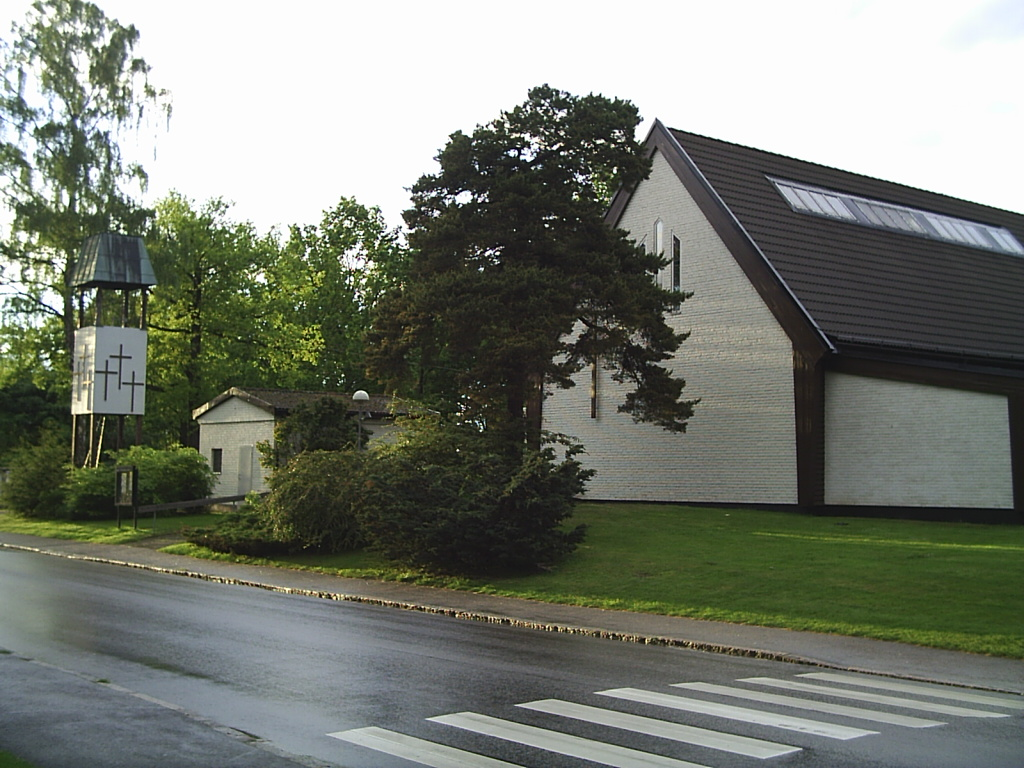 Götalundens församlings kyrka i Trollhättans kommun. Fotograf: Tubaist 12 juni 2005 kl.23.39 (CEST)